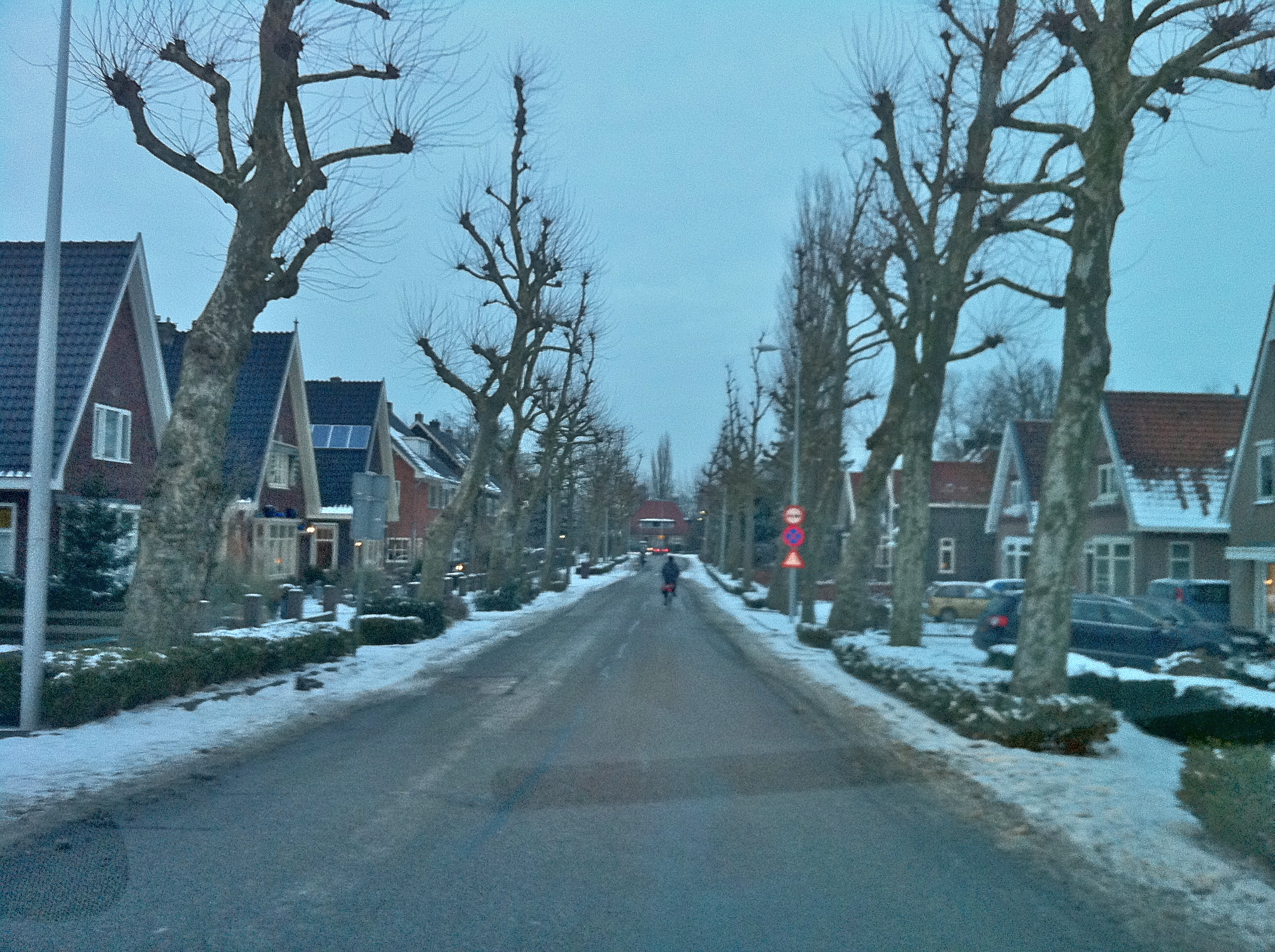 Kadoelerweg, Amsterdam-Noord